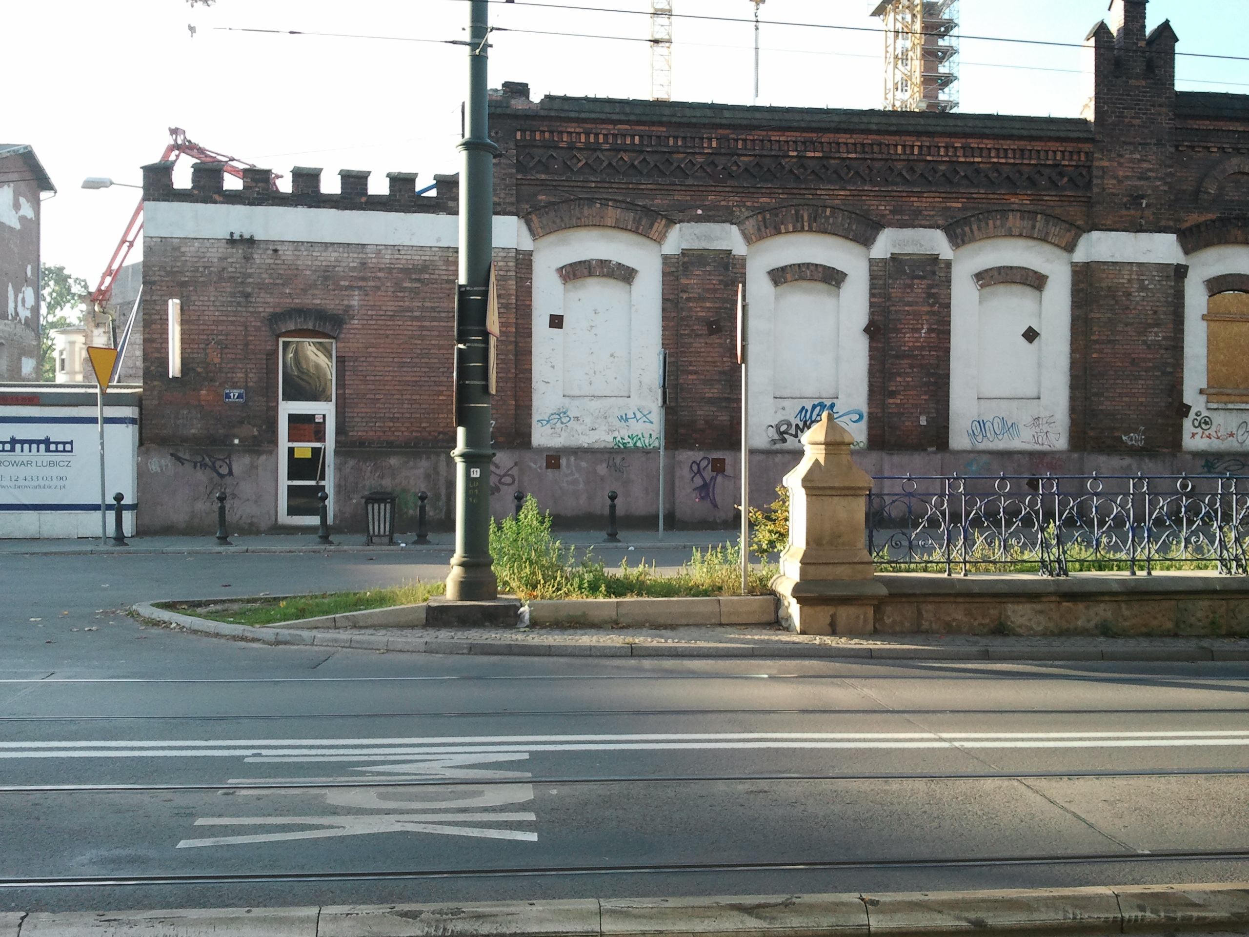 dawniej Browar Okocim, ul. Lubicz 17, Kraków